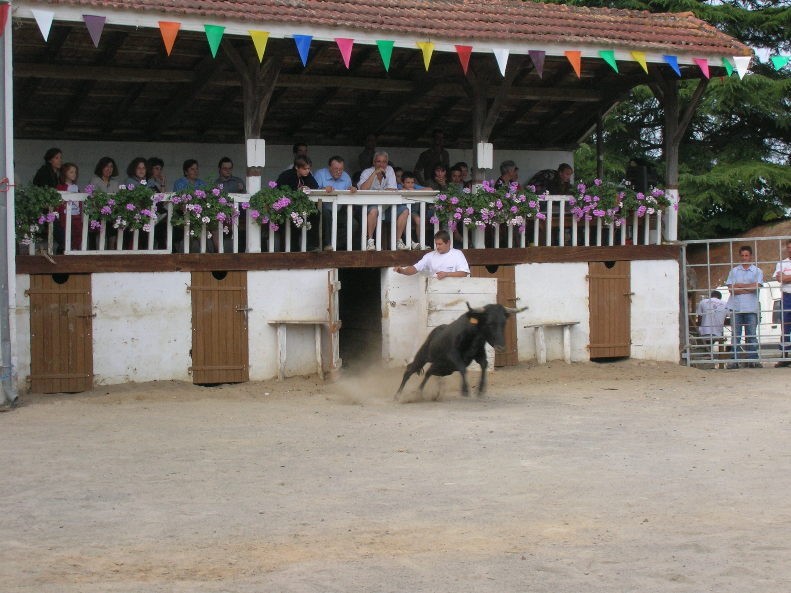 Arènes de Baigts